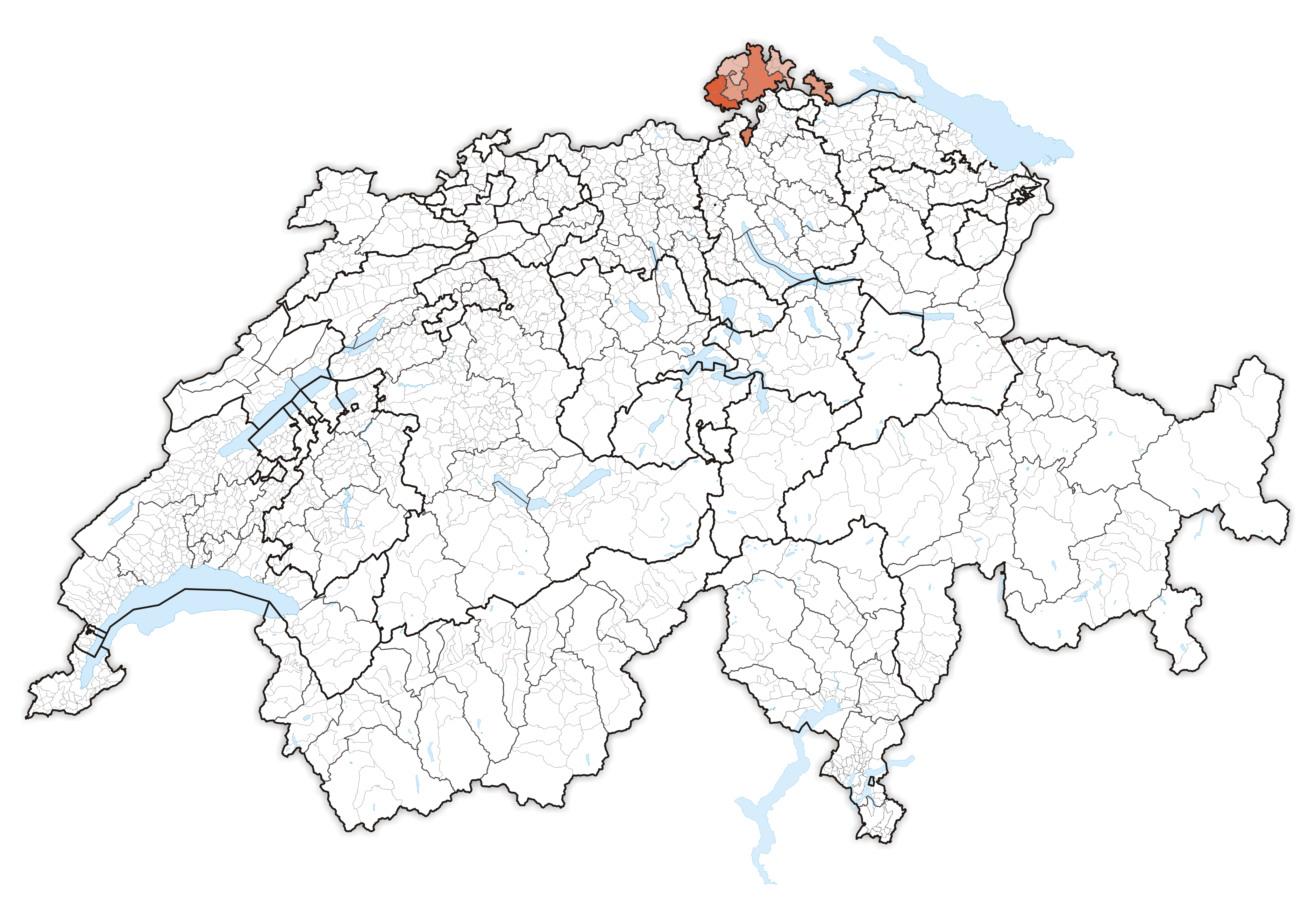 Canton Schaffhausen